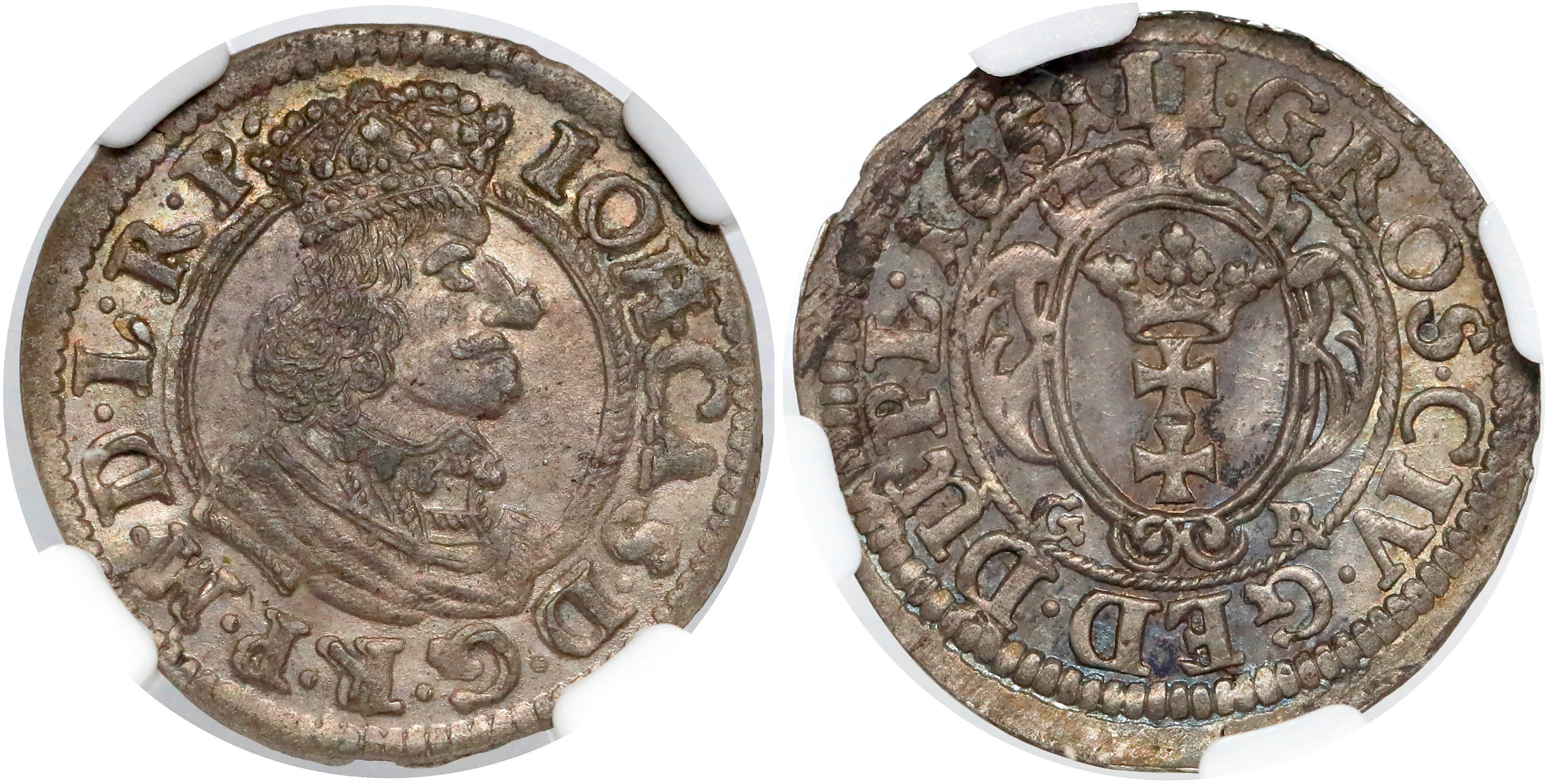 Dwugrosz 1651 Gdańsk